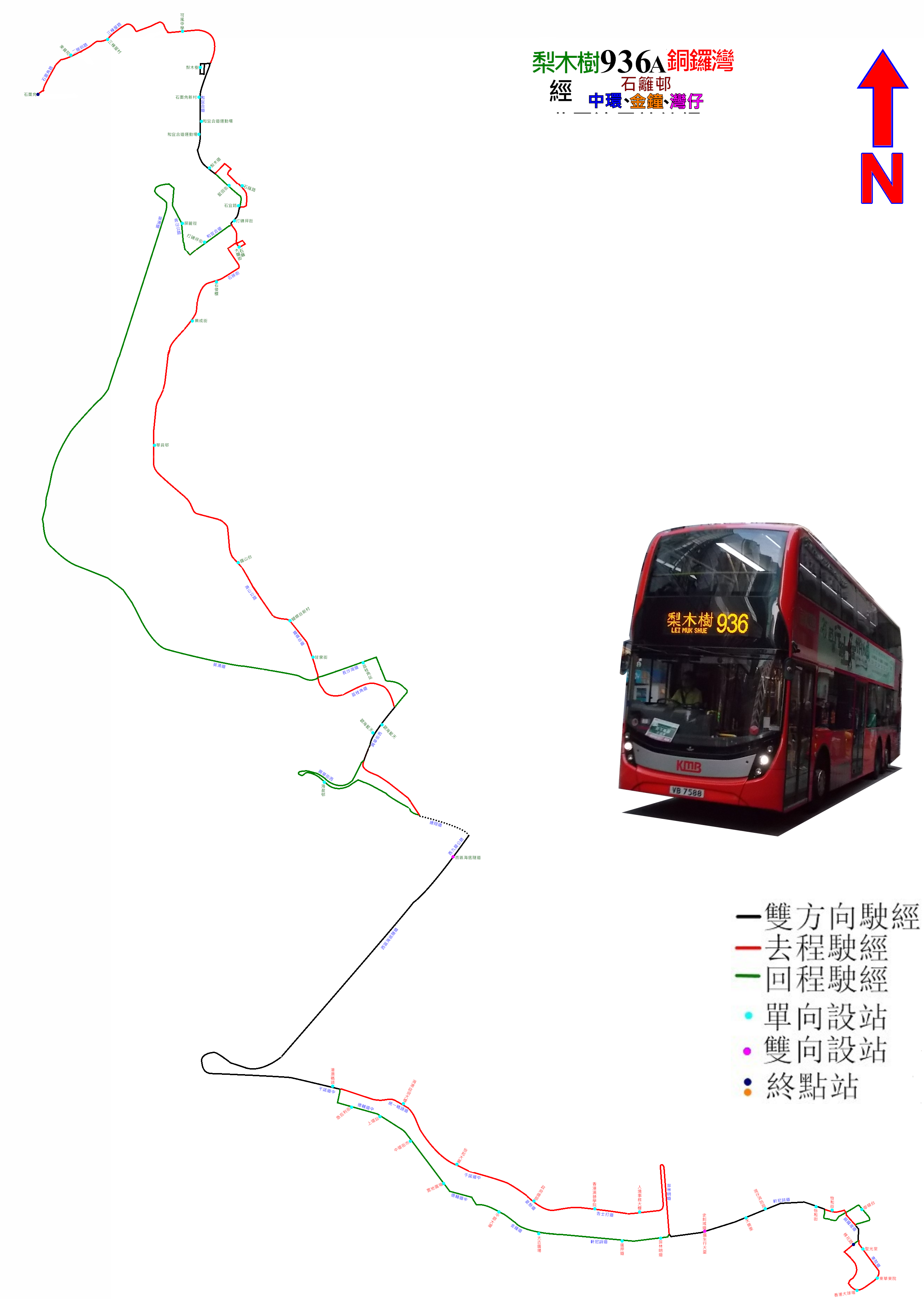 過海隧巴936A線的走線圖